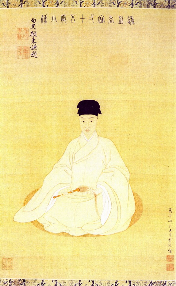 Portrait de Wang Shimin, rouleau mural, encre et couleur sur soie, 1616. 64x42,3cm. Musée d'art de Tianjin, du peintre chinois Zeng Jing, 1564-1647.